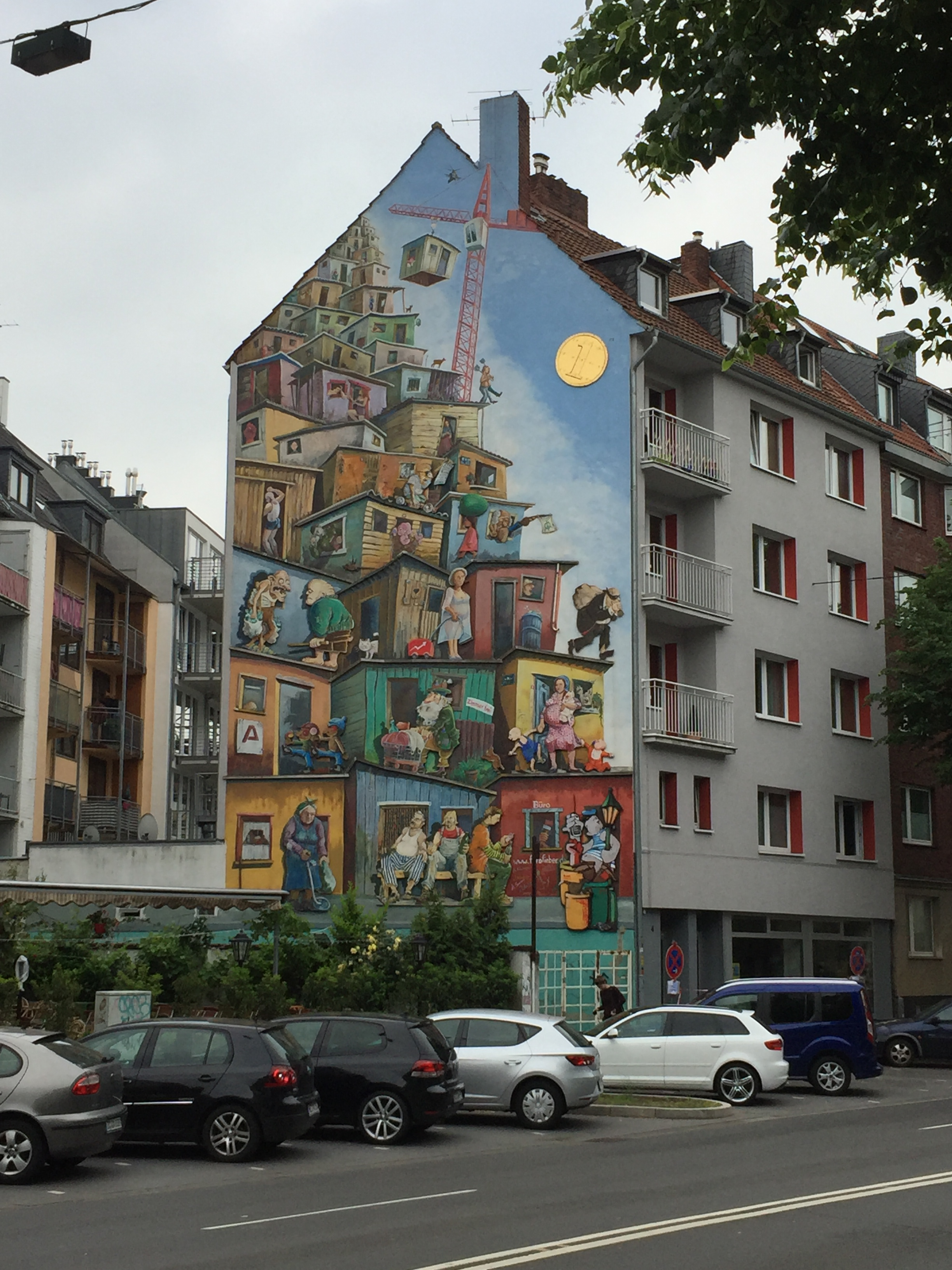 Graffiti Hauswand Düsseödorf